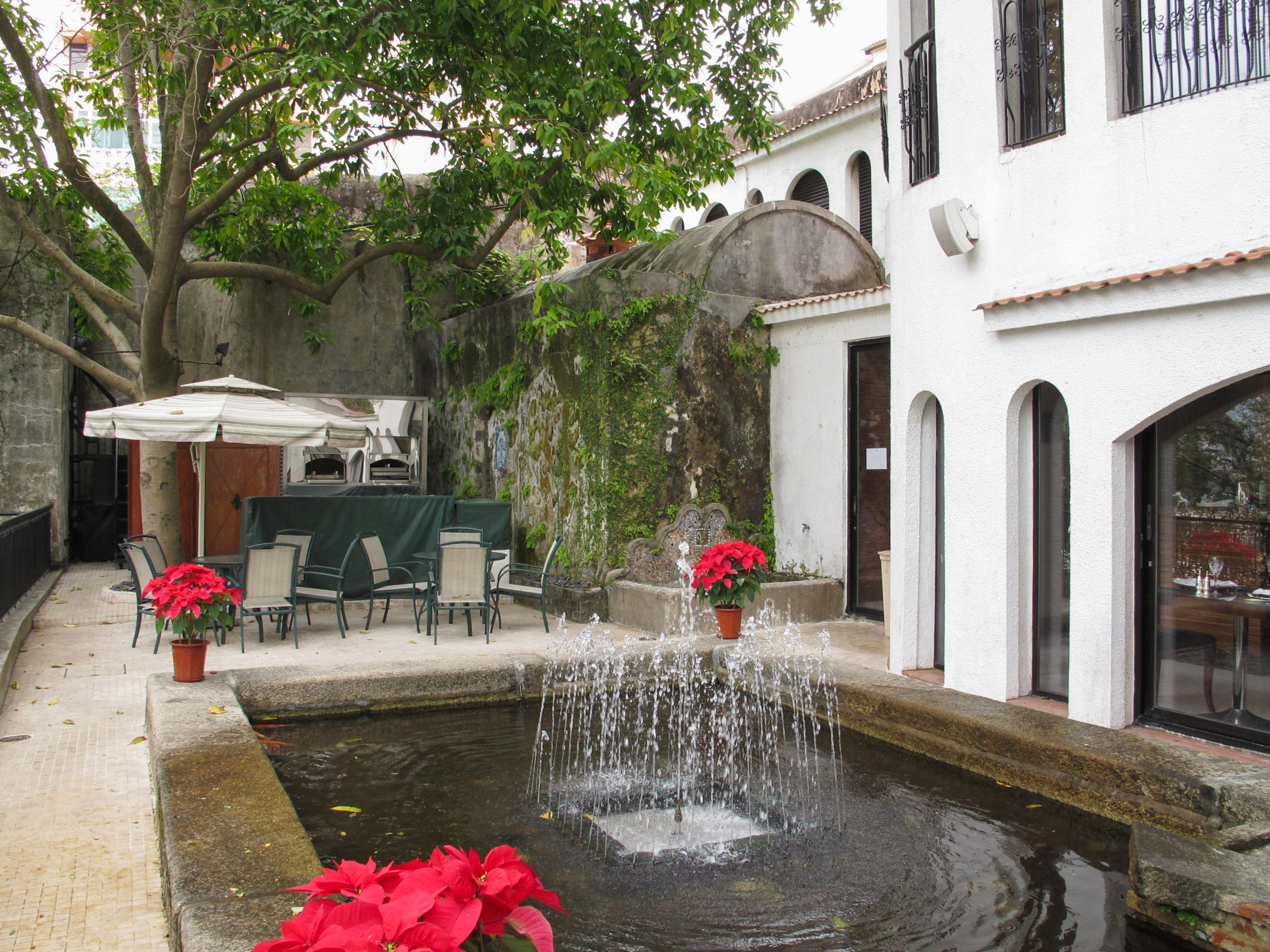 Pousada de São Tiago Courtyard